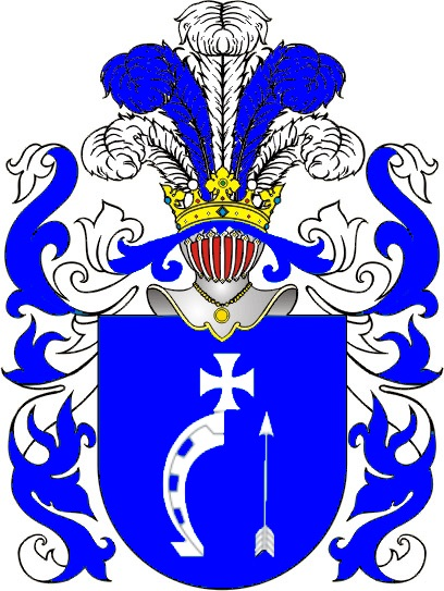 Шляхетский Герб "Крупос"